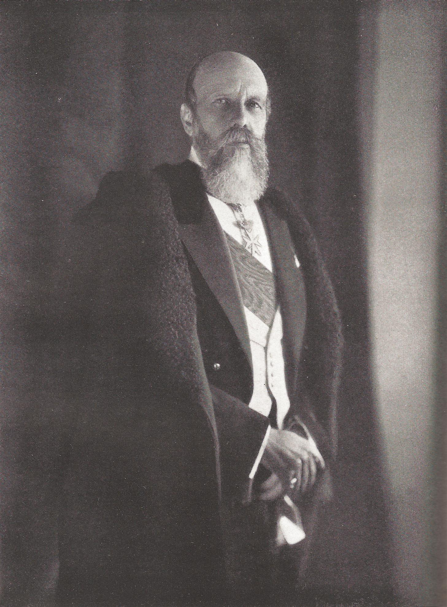 Henry B. de Fischer, Architekt und Ehren- und Devotions-Grosskreuz-Bailli des Malterserordens.